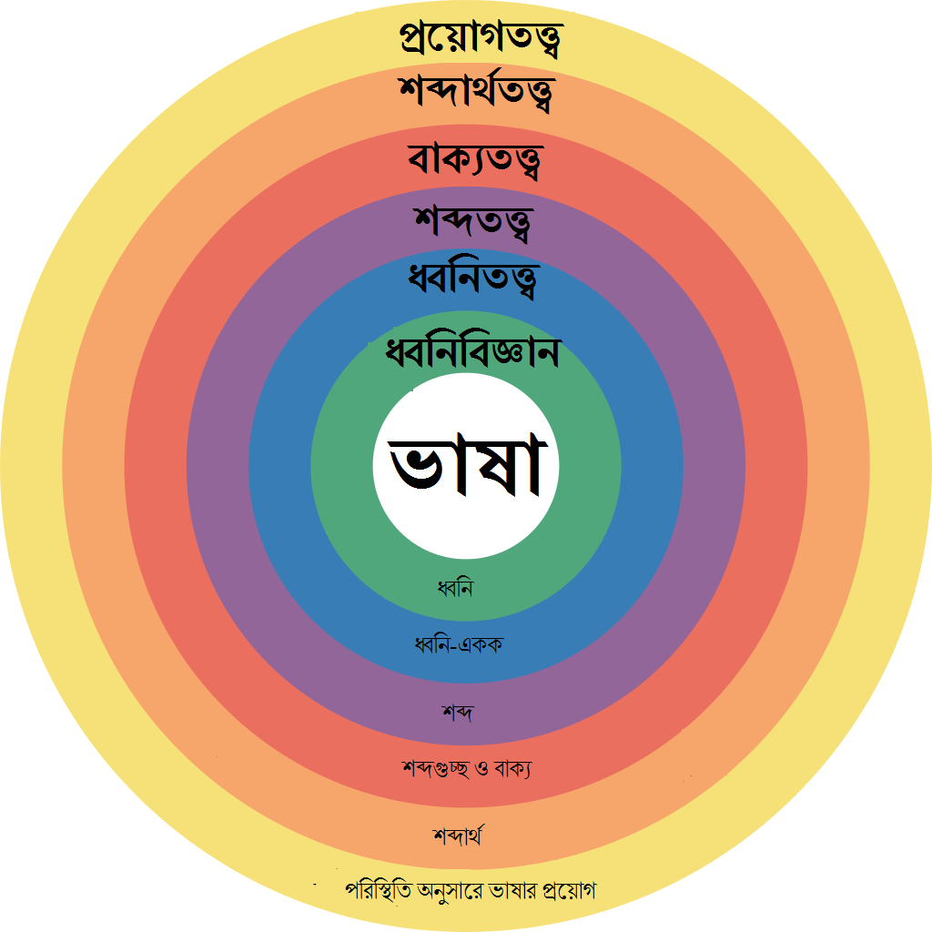 ভাষার কাঠামোর বিভিন্ন স্তরের ওপর ভিত্তি করে ভাষাবিজ্ঞানের শাখা